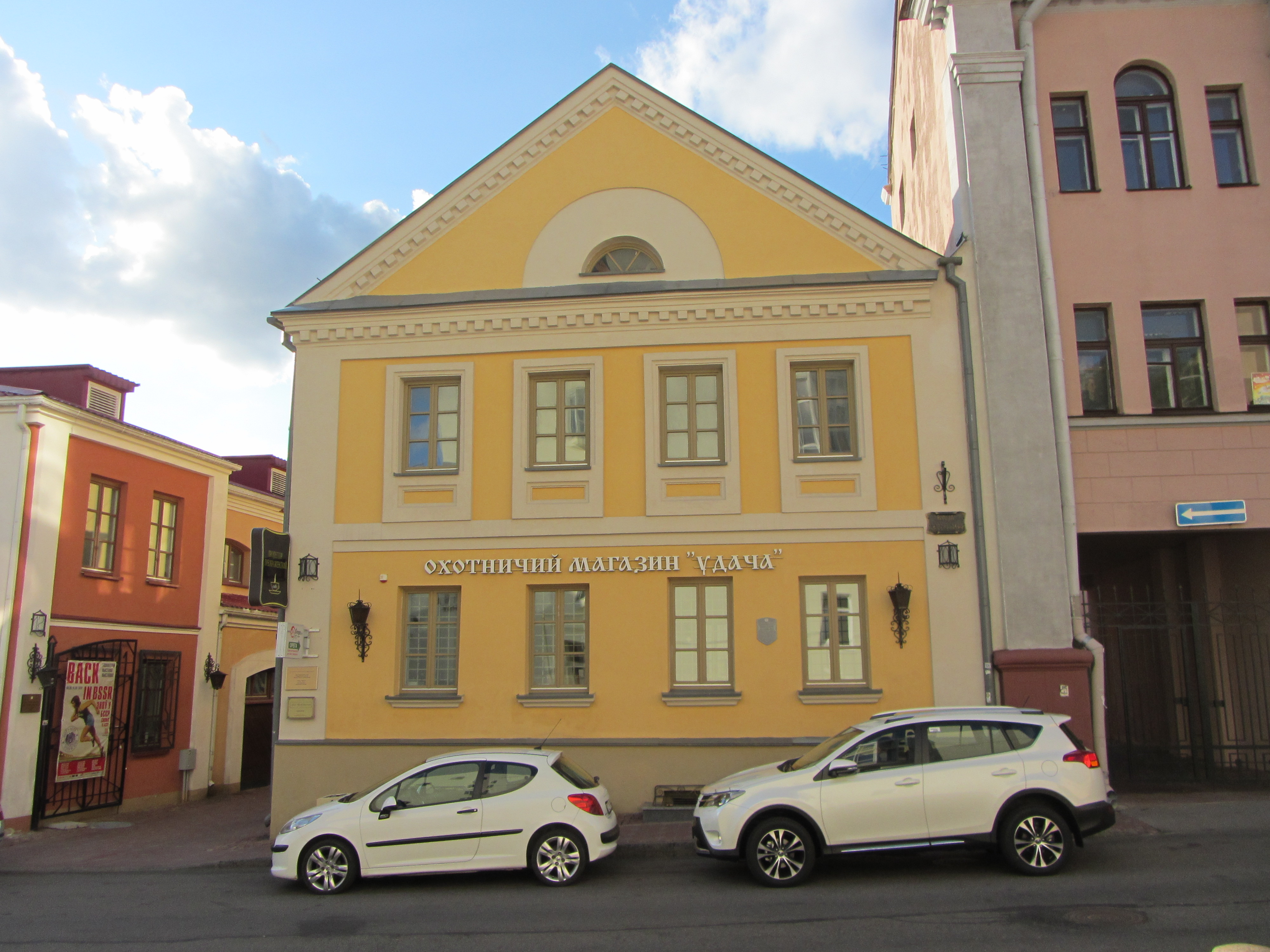 Беларуская (тарашкевіца): Вуліца Рэвалюцыйная, 10